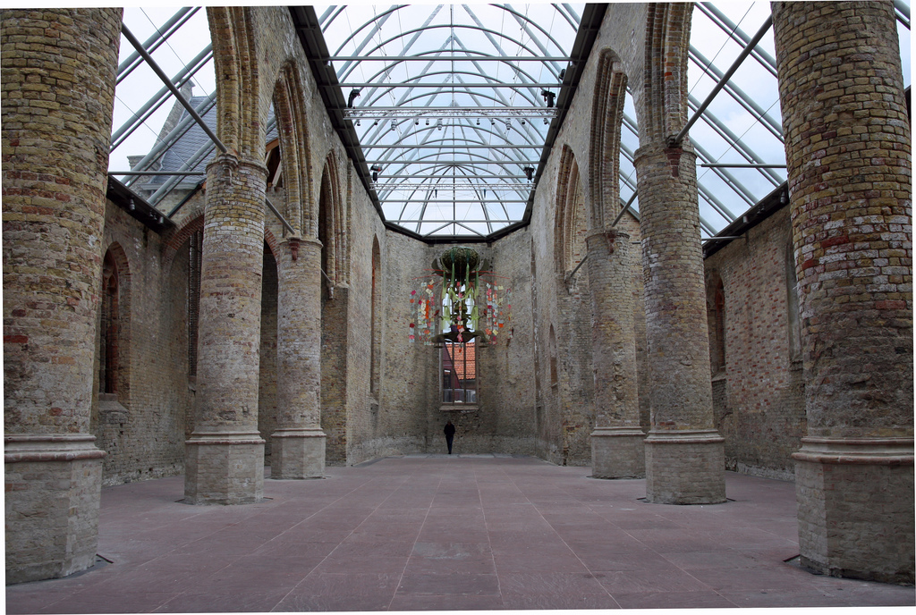 Broerekerk te Bolsward. Geconserveerde ruïne van in 1980 afgebrande kerk. Glazen dak 3 jaar geleden geplaatst (in 2005-2006)